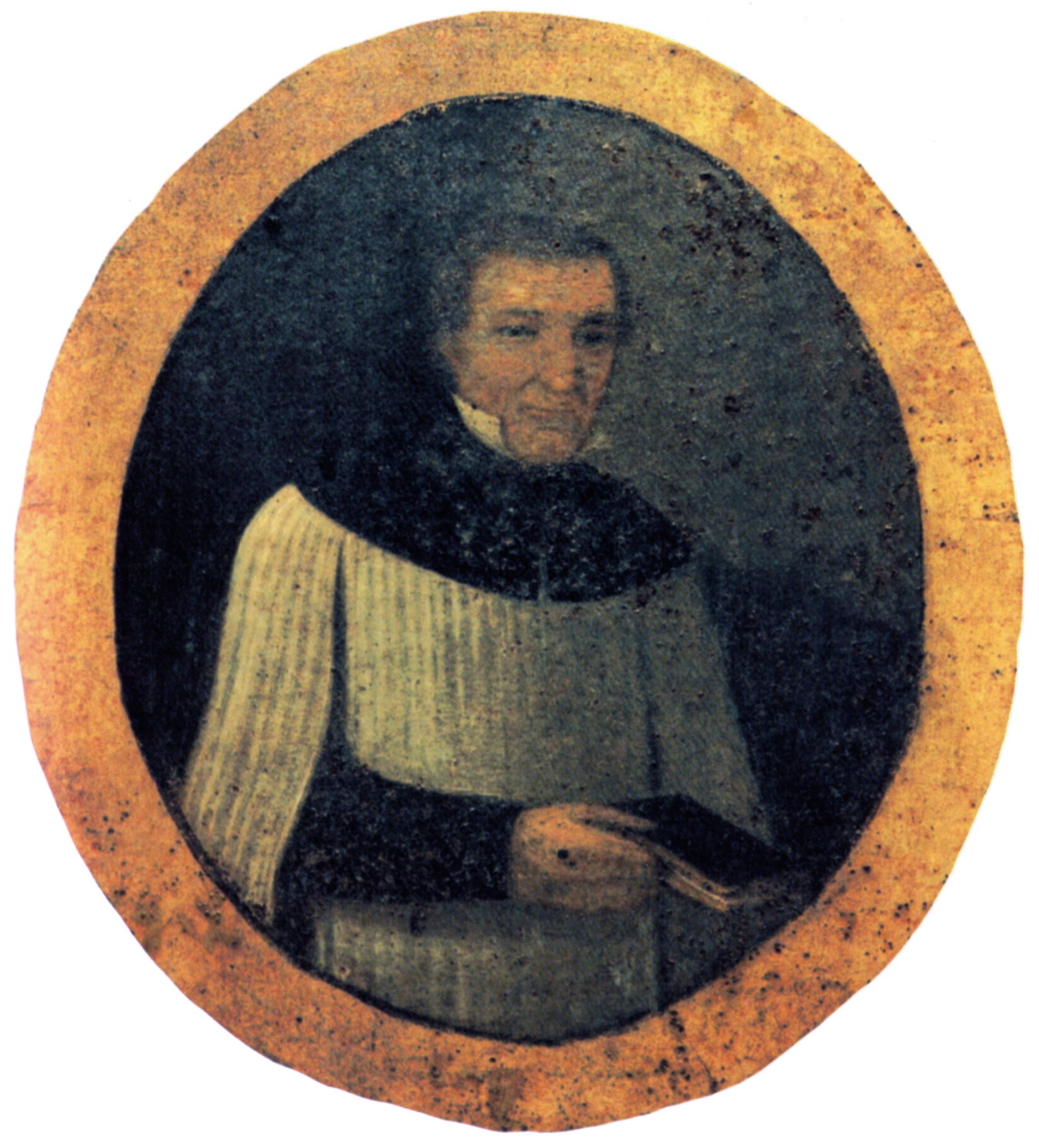 Jakob Joseph Matthys (1802–1866), Portrait auf der Grabtafel, heute im Beinhaus Wolfenschiessen